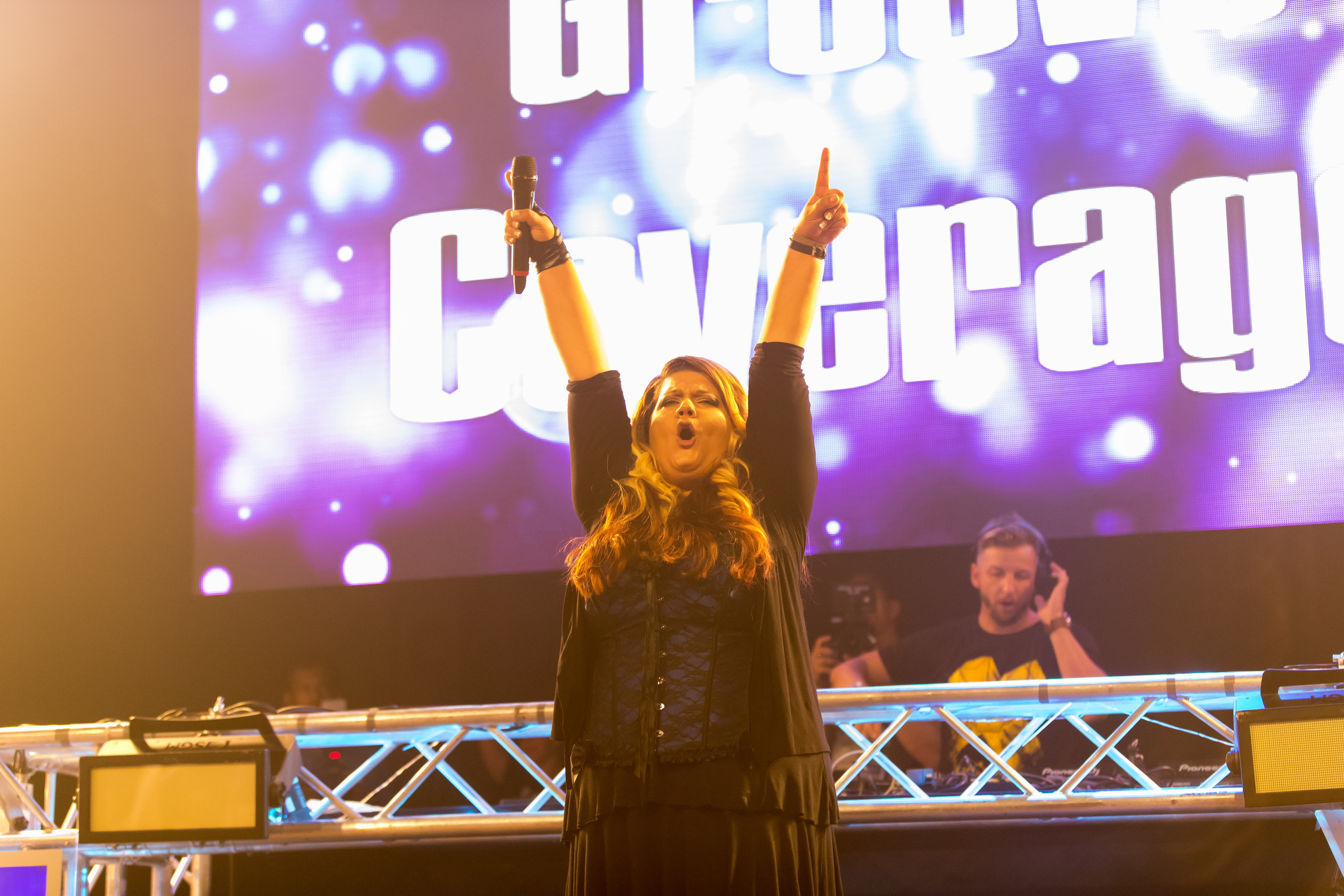 Groove Coverage during Sunshine Live - Die 2000er Live on Stage at Maimarkt Club, Mannheim, Baden-Württemberg, Germany on 2016-09-11, Photo: Sven Mandel